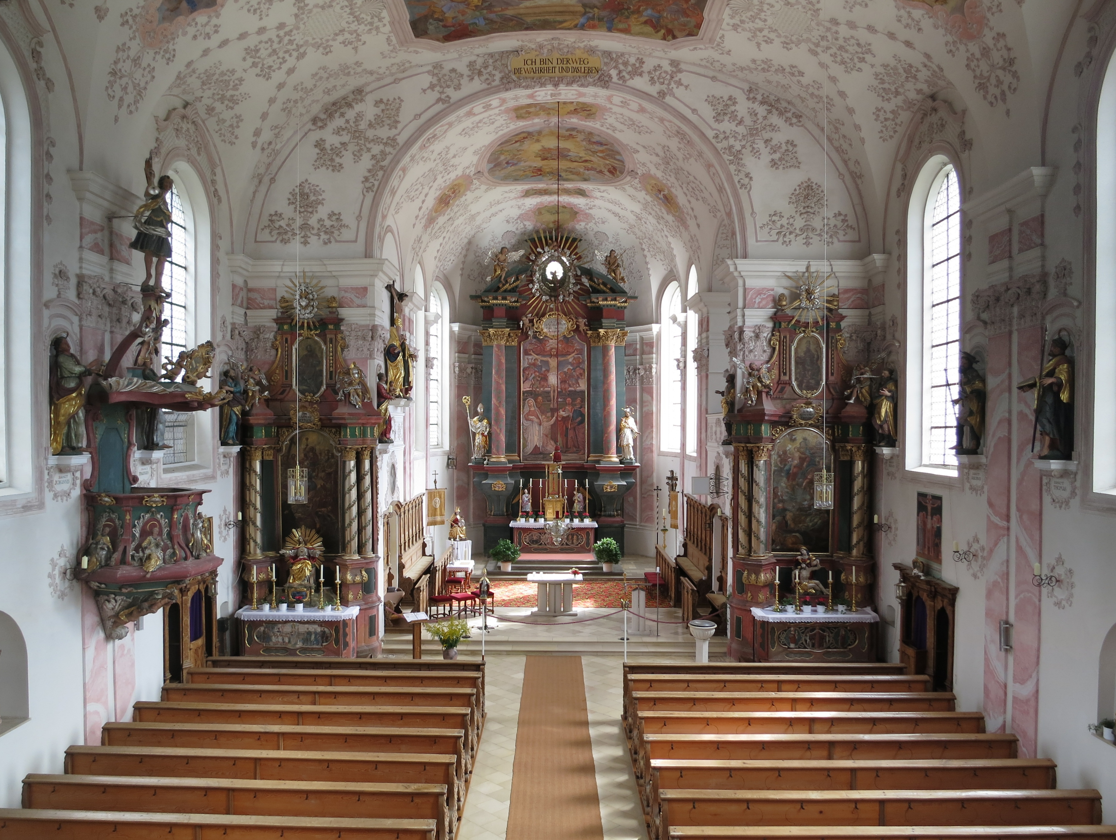 Kirche St. Martin in Pfaffenhofen an der Zusam. Langhaus. Blick aus West